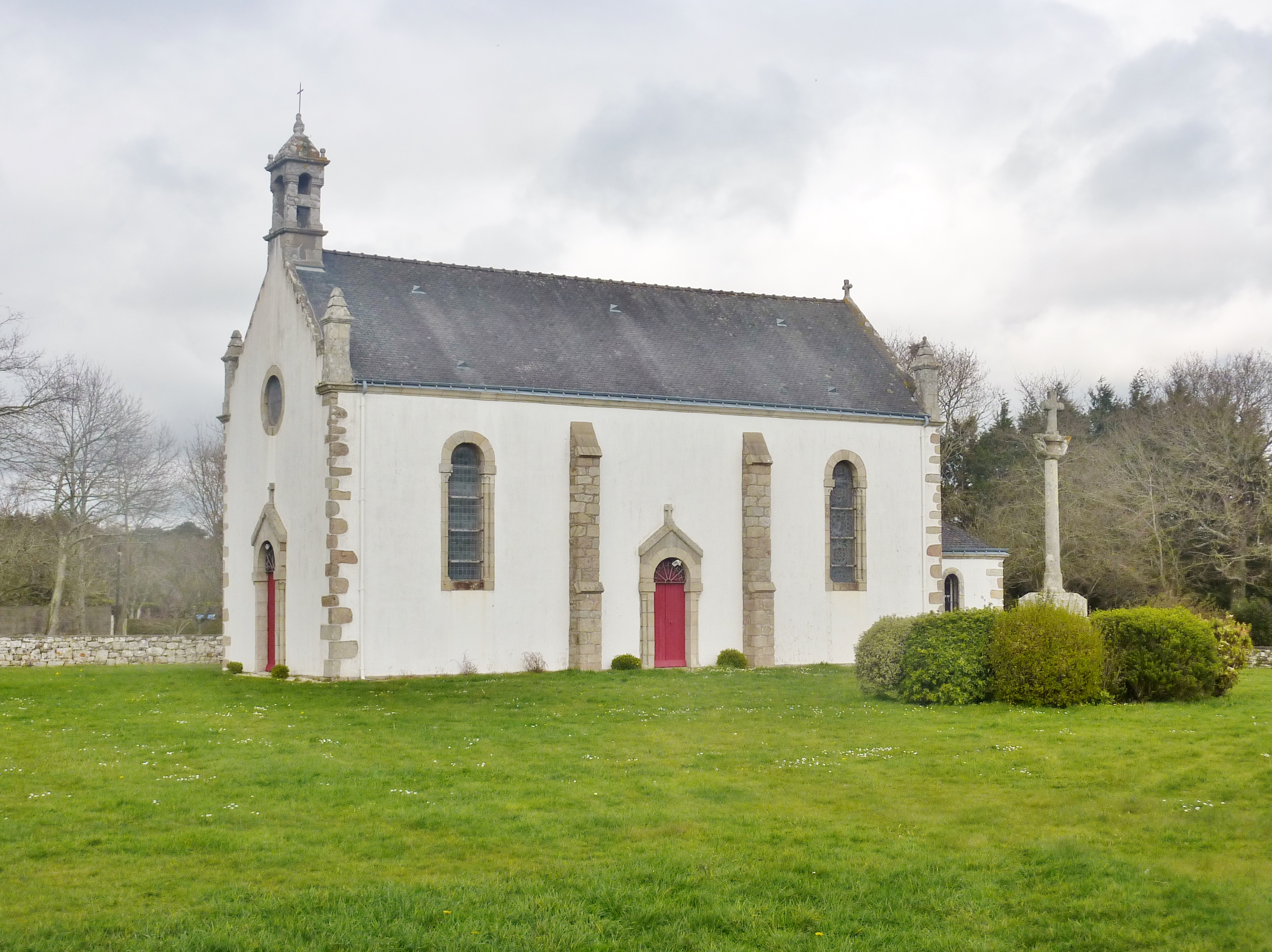 Guidel (Morbihan) : la chapelle de la Madeleine (cette chapelle date de 1883, mais a été construite en remplacement d'une chapelle plus ancienne datant du XVIIIe siècle, elle même remplaçant probablement une chapelle plus ancienne. Les chapelles portant le nom "La Madeleine" sont associées à la maladie de la lèpre et sont pour cette raison construites à l'écart des agglomérations